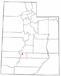 Localización de Marysvale (Utah)